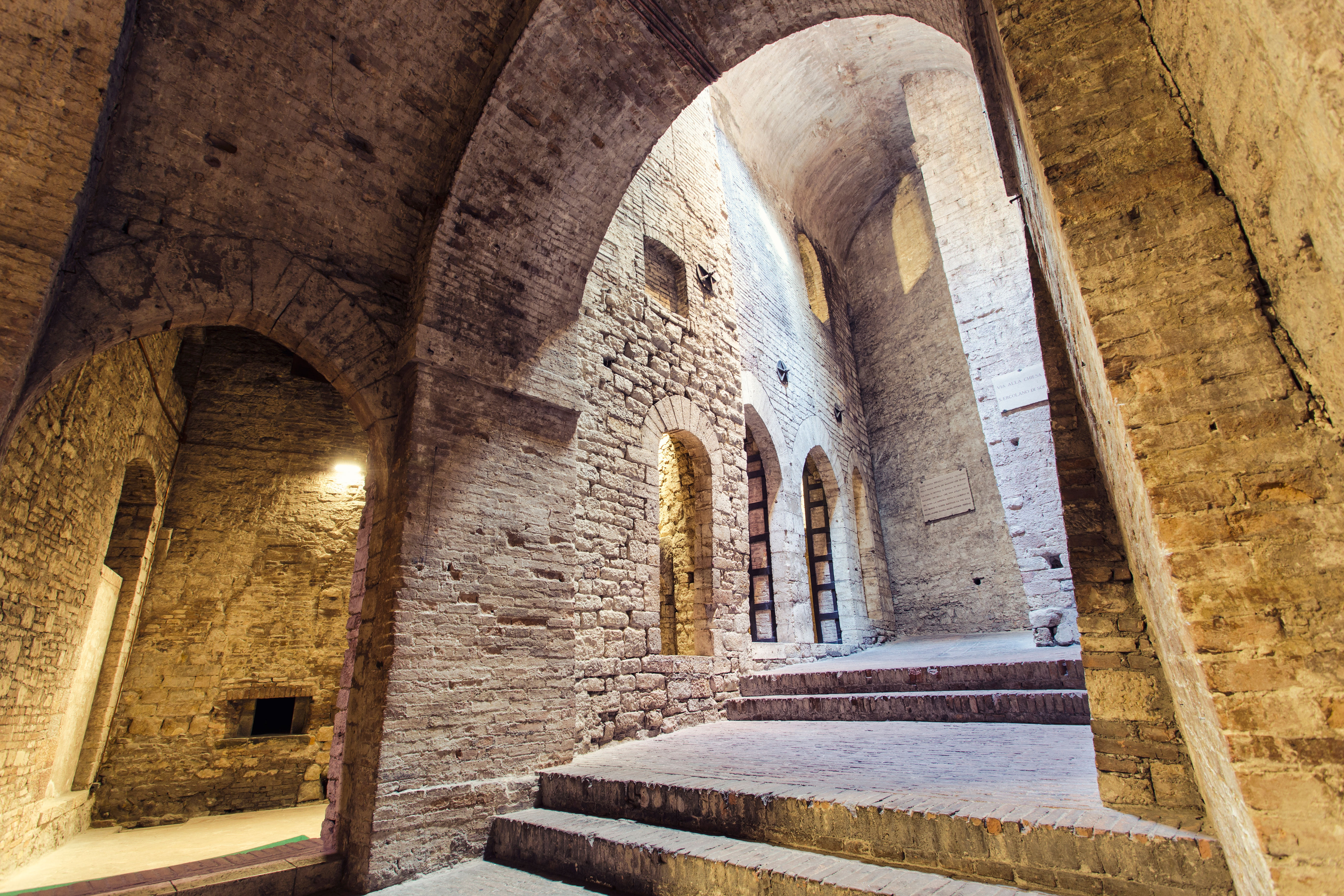 Rocca Paolina This is a photo of a monument which is part of cultural heritage of Italy.